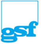 Logo des früheren „GSF – Forschungszentrums für Umwelt und Gesundheit“